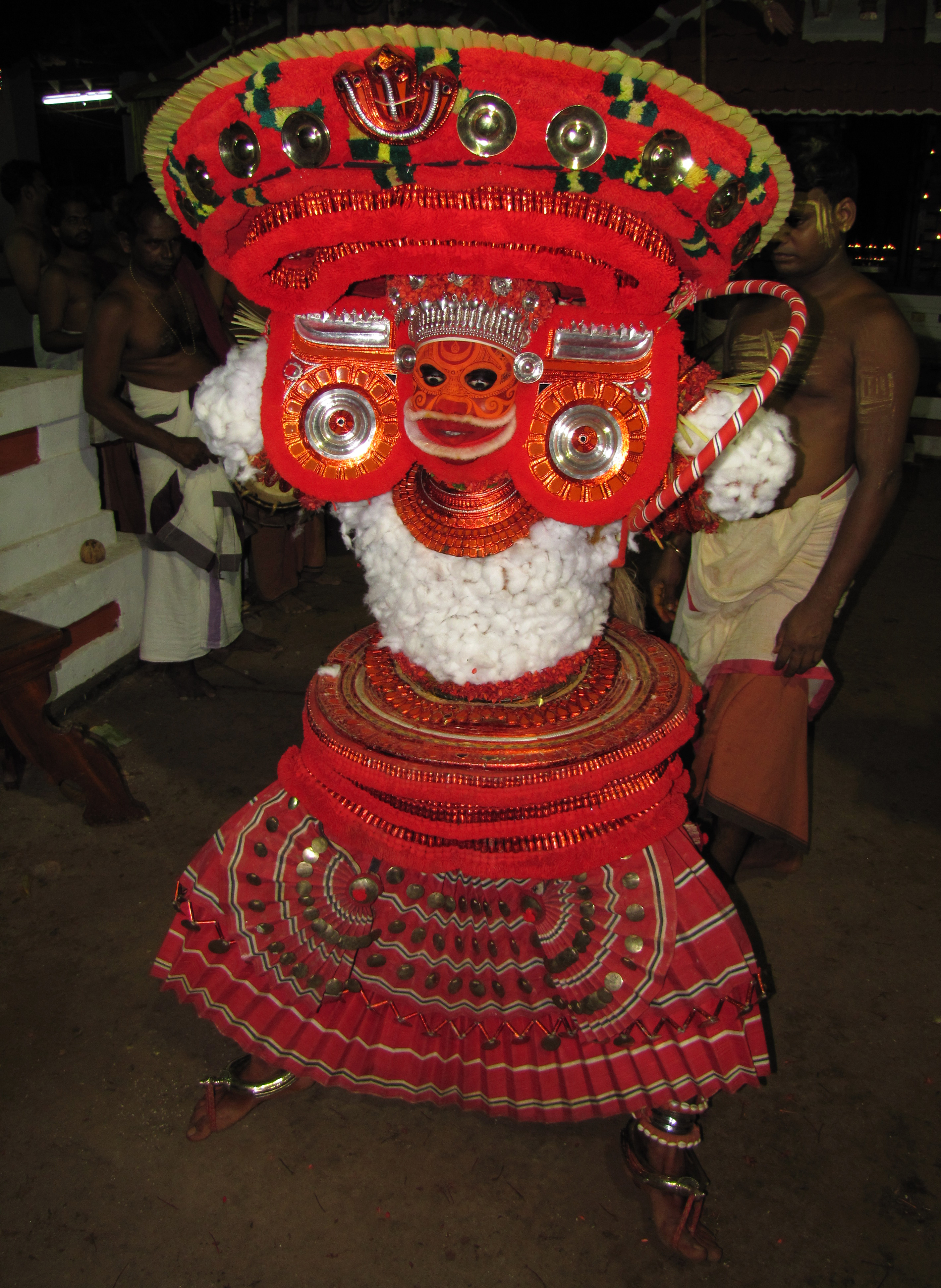 Pulikkandan at Maratthakkaattu Sree Aivar Paradevatha Kshethram, Kuppam